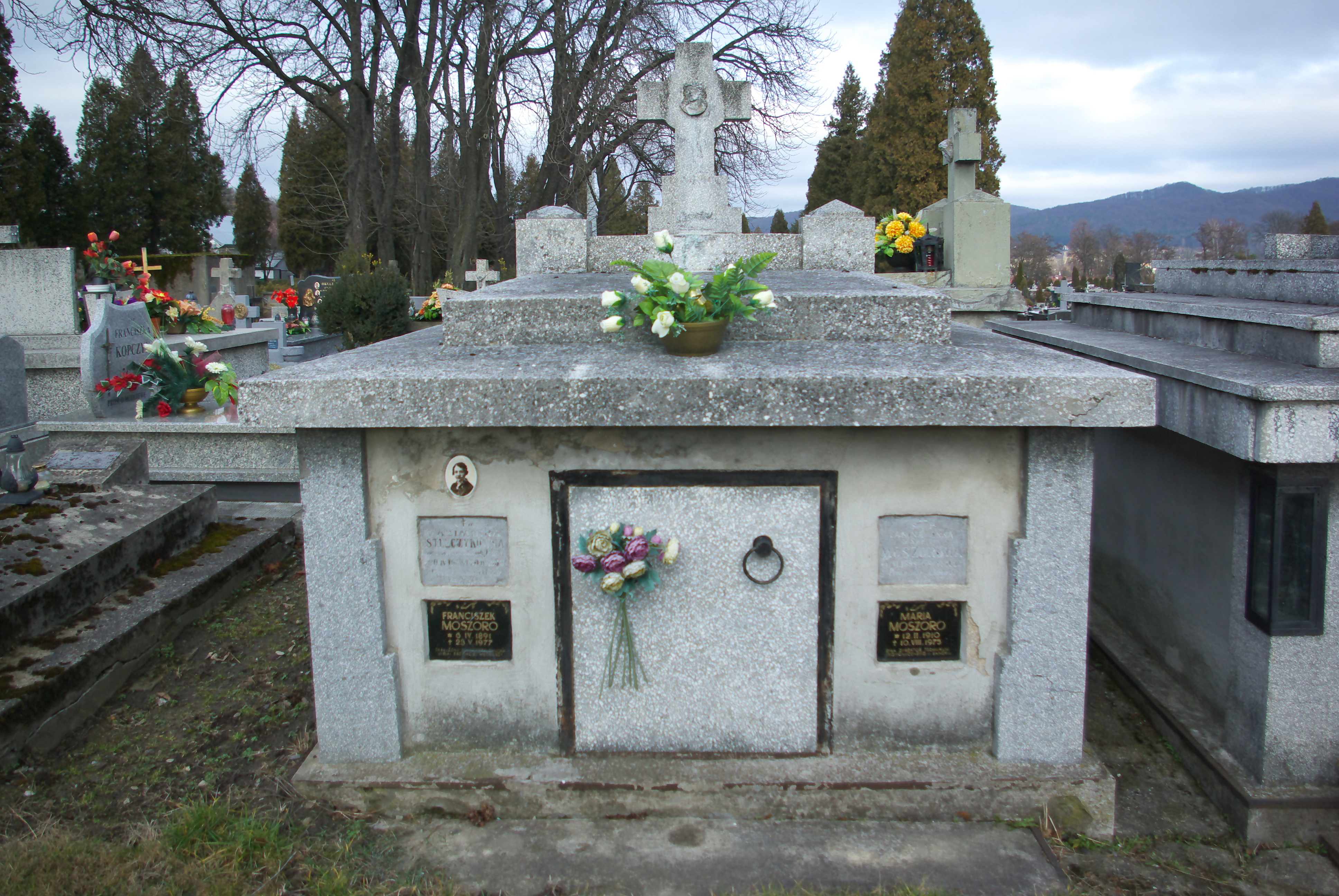 Grobowiec rodziny Robak na Cmentarzu Centralnym w Sanoku.